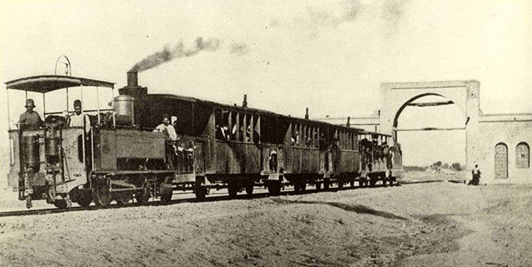 ماشین دودی در زمان قاجار